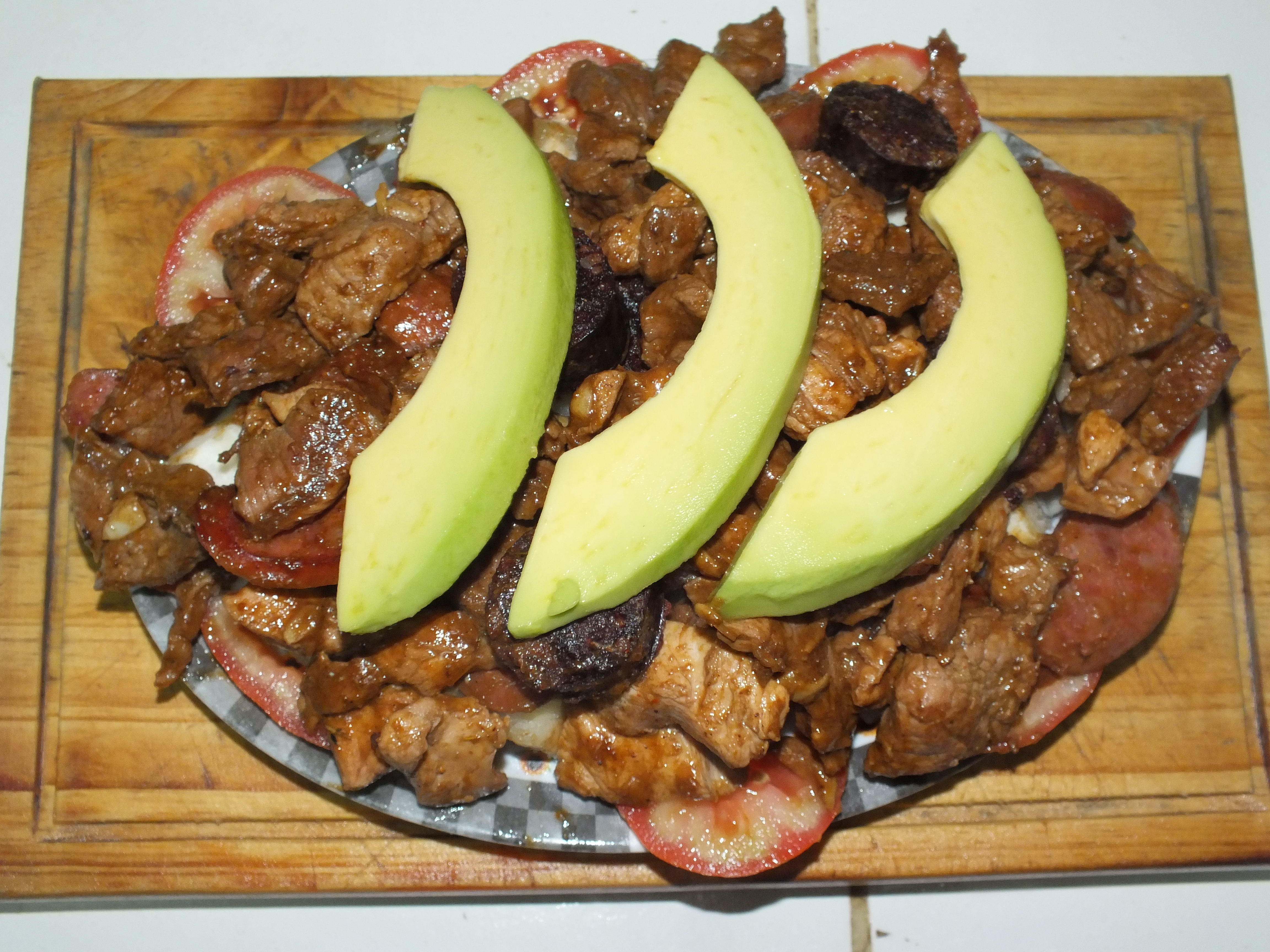 Este plato es muy consumido hacia la zona del Estado Miranda